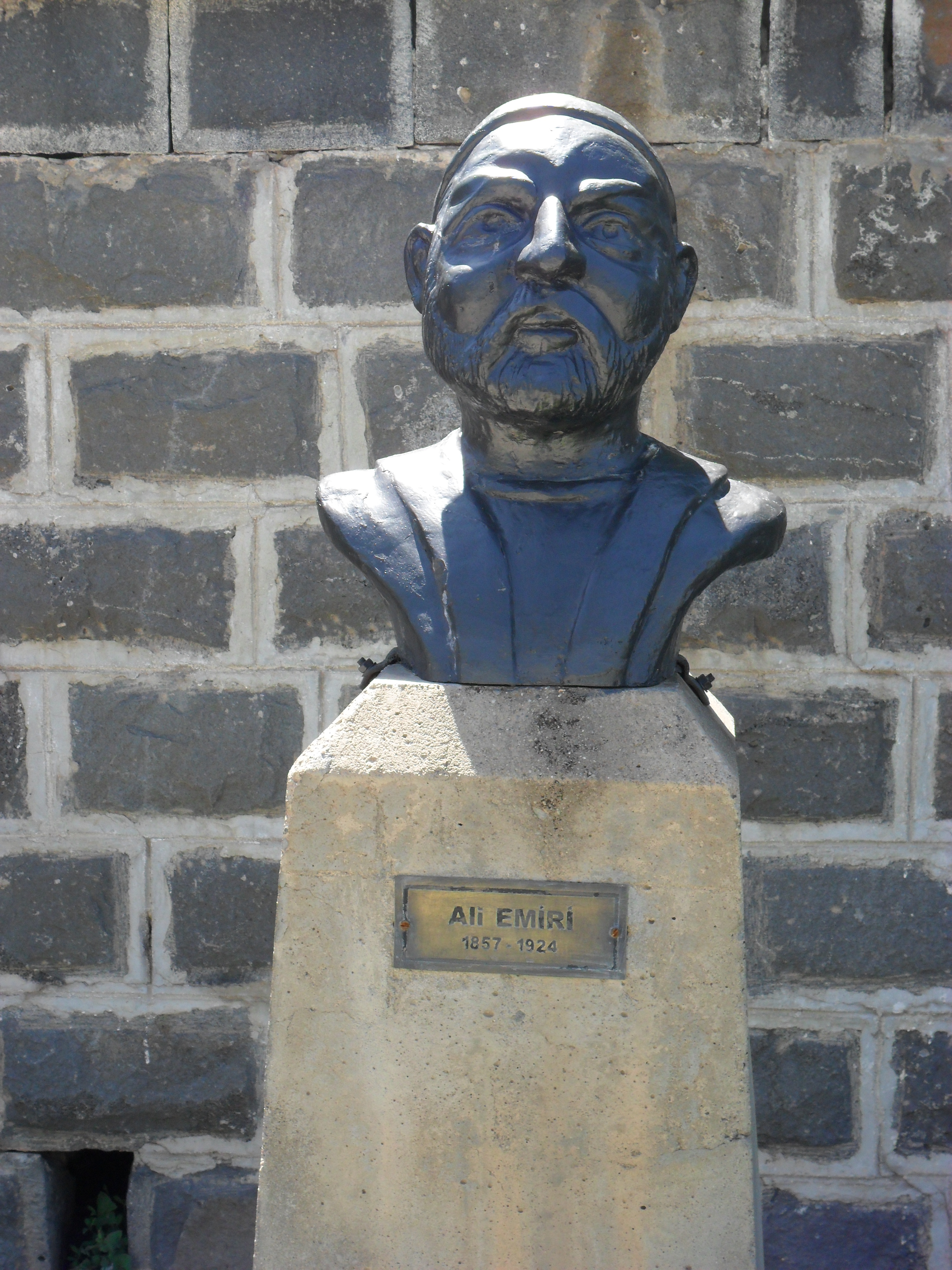 Gazi Köşkü'ndeki Ali Emiri'nin büstü, Diyarbakır.